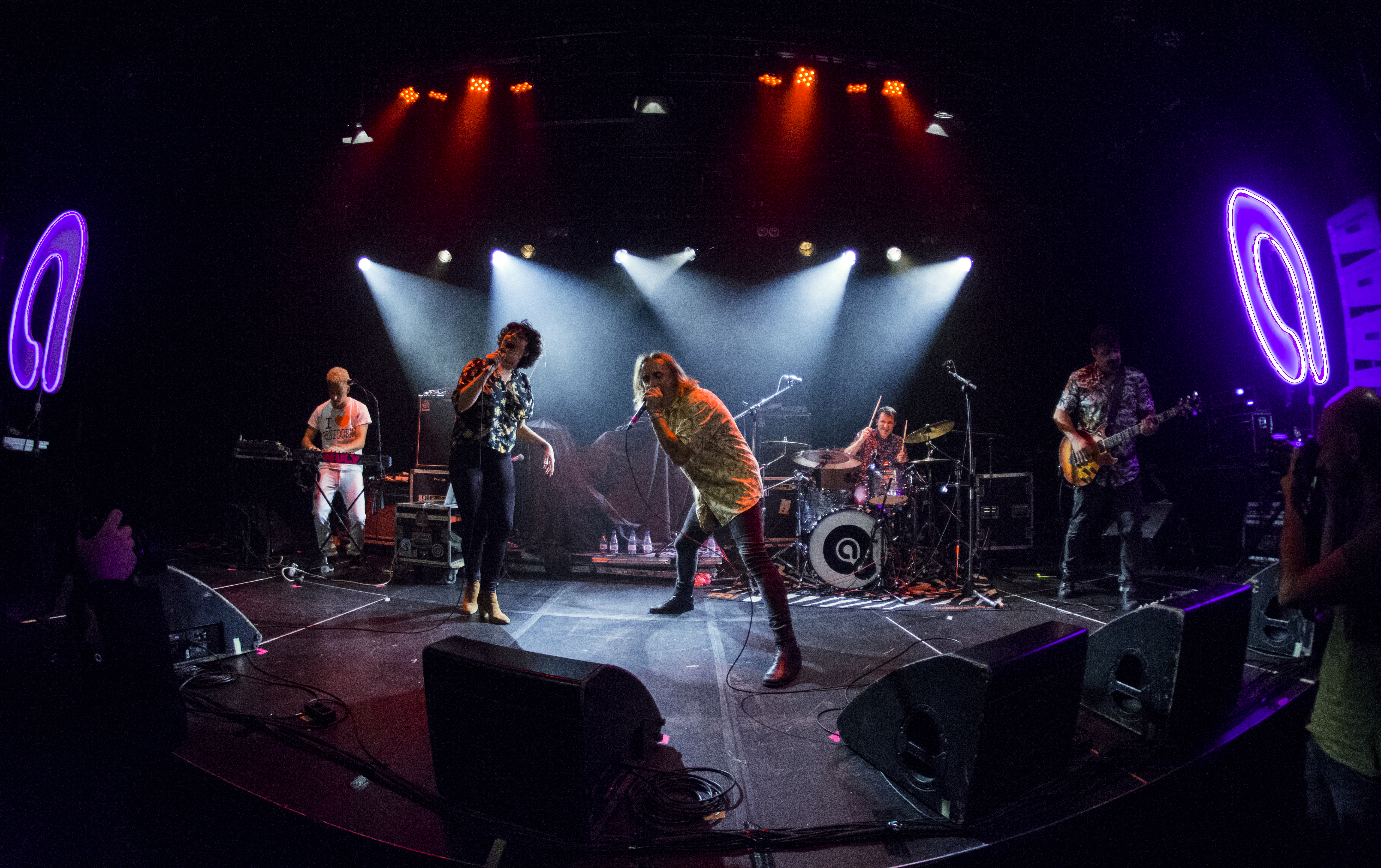 Dkluba kontzertua Intxaurrondo K.E.an. Argazkiak/fotos: Josetxo Pérez 2017/10/26